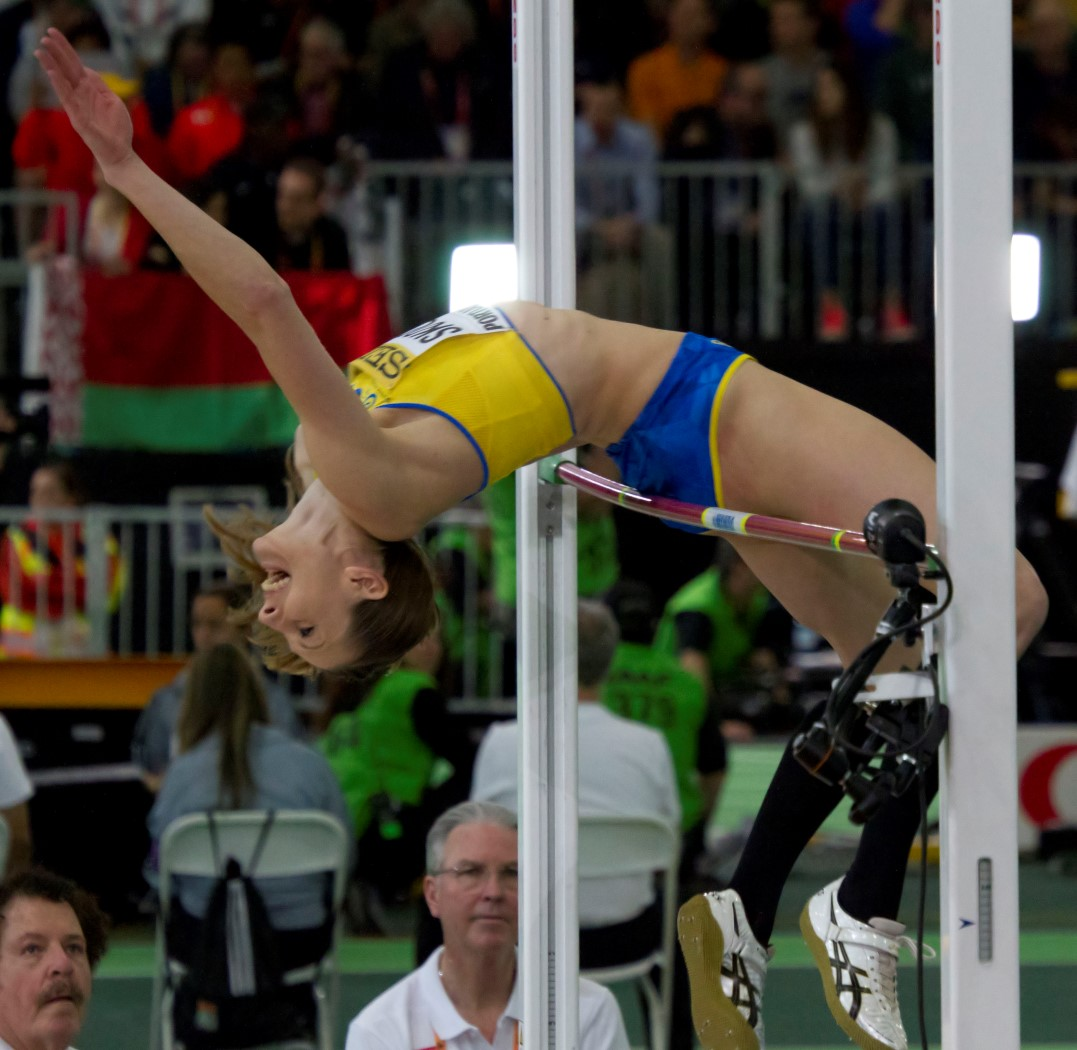 5097 skoog